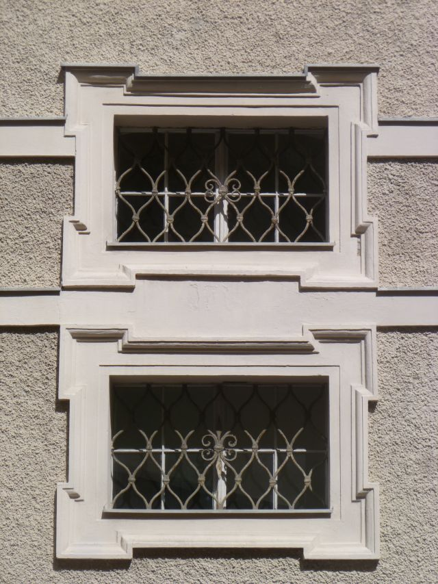 Fenstergitter in der Fraziskanerkirche